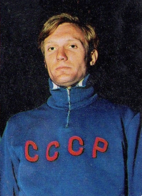 CAMPIONI dello SPORT 1973/74-Figurina n.46- TARMAK -ATLETICA LEGGERA-Rec